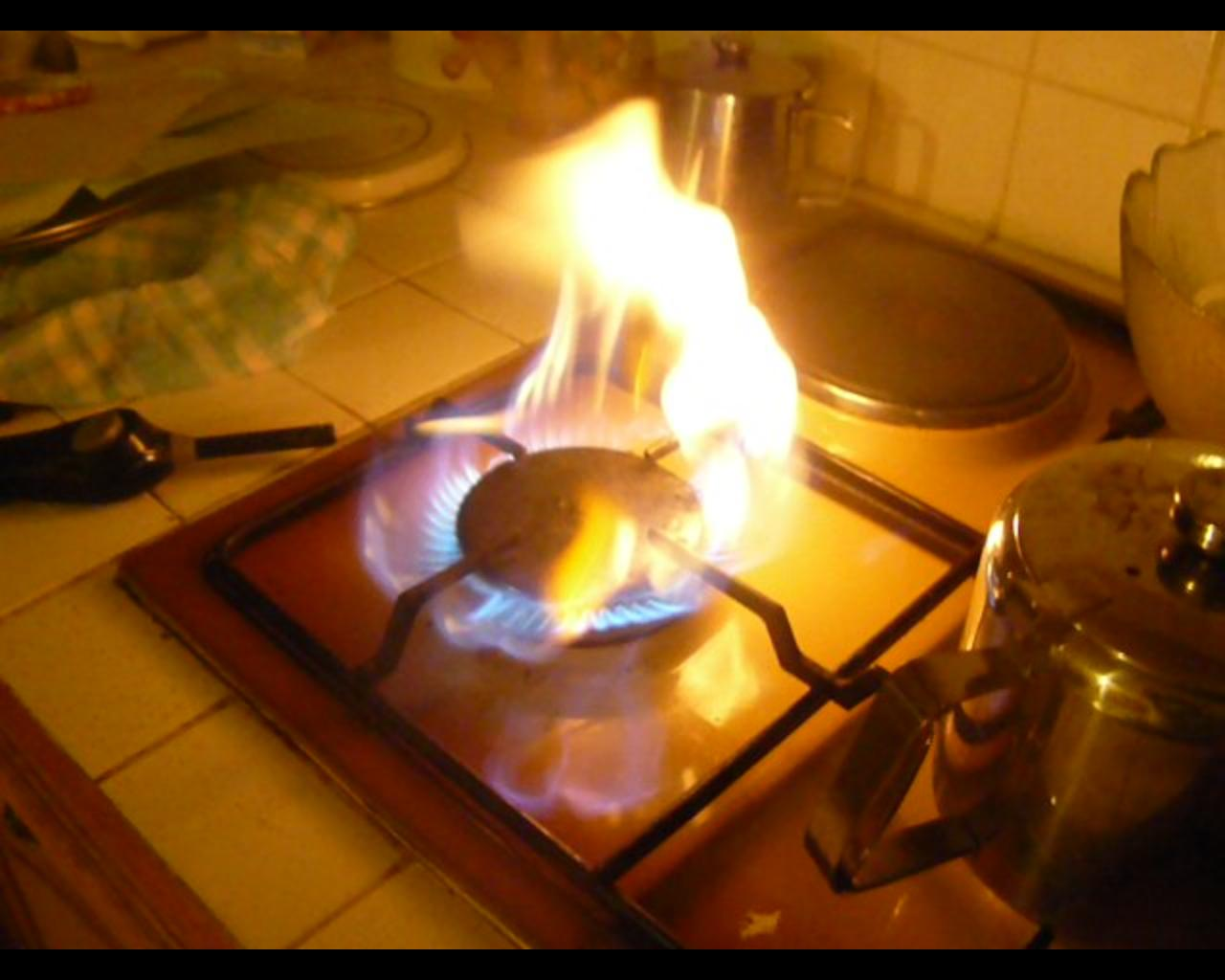 Combustion explosive du butane